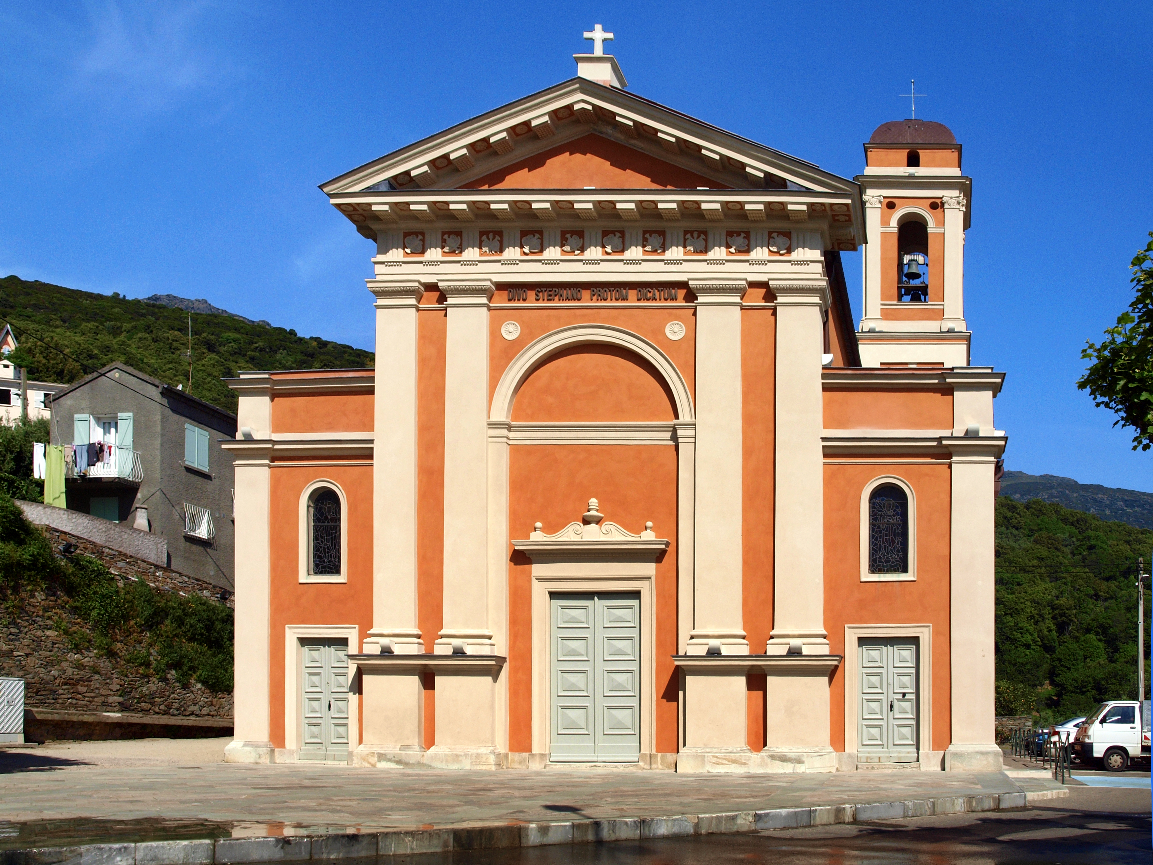 Bastia (Corse) - Église Saint-Etienne (San Stefano) de Cardo, sur les hauteurs de la ville